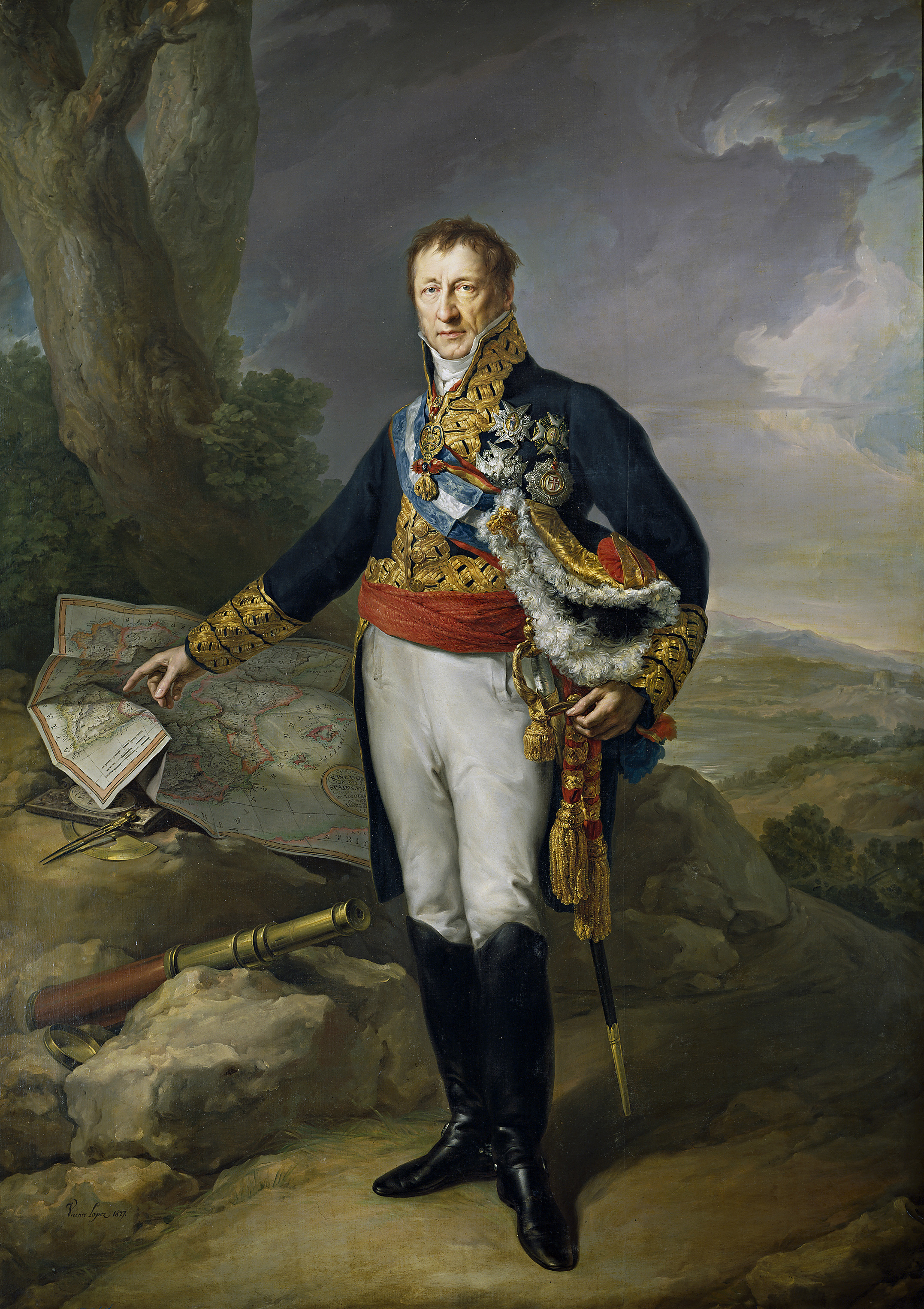 Retrato del teniente general Pedro de Alcántara Álvarez de Toledo y Salm-Salm (1768-1841), XIII duque del Infantado, IX duque de Pastrana, IX duque de Pastrana, IX duque de Estremera, X duque de Francavilla y XII marqués de Távara, entre otros títulos nobiliarios, y caballero de la Orden del Toisón de Oro. Falleció en Madrid en 1841.